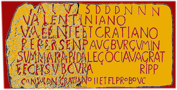 Umzeichnung der 1906 gefundenen Bauinschrift des spätantiken Wachturms Koblenz-Kleiner Laufen (CH). Sie stammt aus dem Jahr 371 n.Chr. und nennt den antiken Namen des Wachturms (Summa Rapida). Vorlage in: Peter-A. Schwarz: Neue Forschungen zum spätantiken Hochrhein-Limes im Kanton Aargau I. Die Wachtürme Koblenz-Kleiner Laufen, Möhlin-Fahrgraben und Möhlin-Untere Wehren. Mit Beiträgen von Sandra Ammann, Sabine Deschler-Erb, Juha Fankhauser, Lukas Freitag, Simon Jeanloz, Tina Lander und Daniel Schuhmann. Abb.16, S. 53.